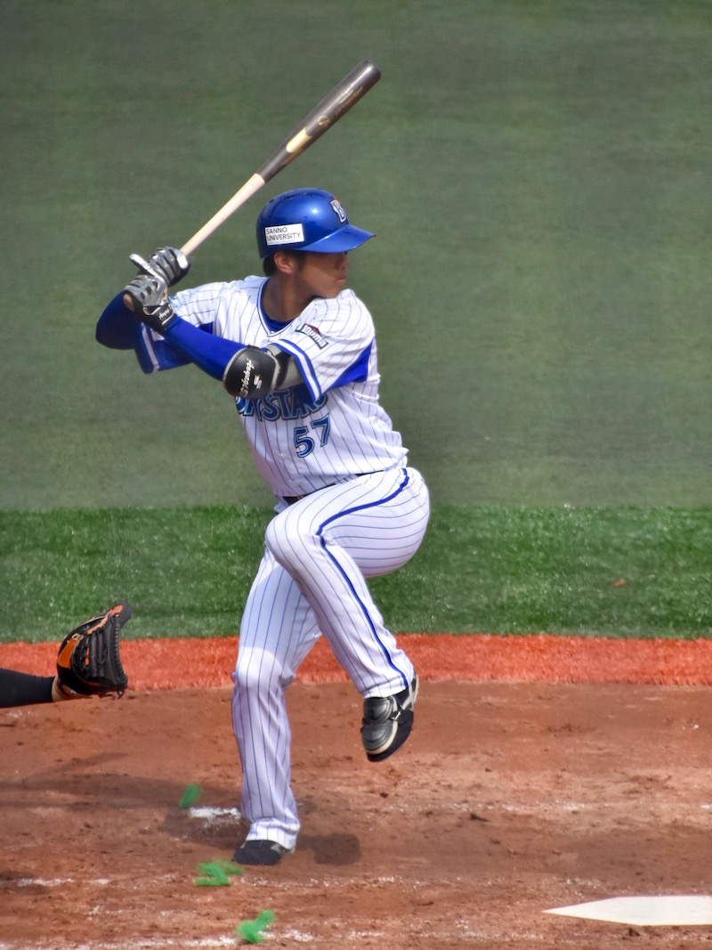 青柳昴樹打撃フォーム（2016年3月5日横須賀スタジアム）